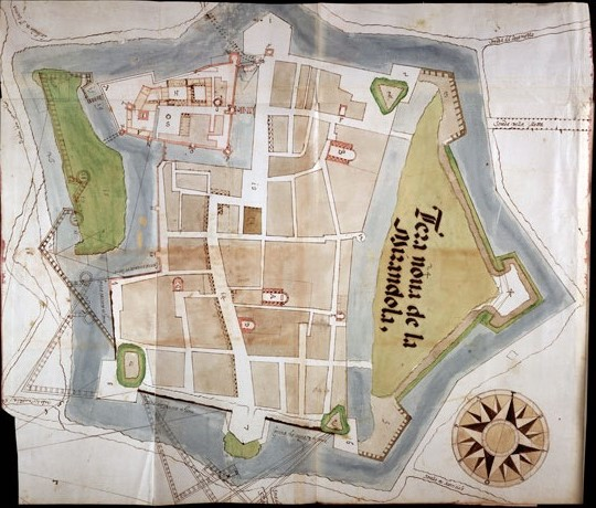 Anonimo, Terra Nova de la Mirandola (disegno a penna su carta, parzialmente acquerellato, post 1561)